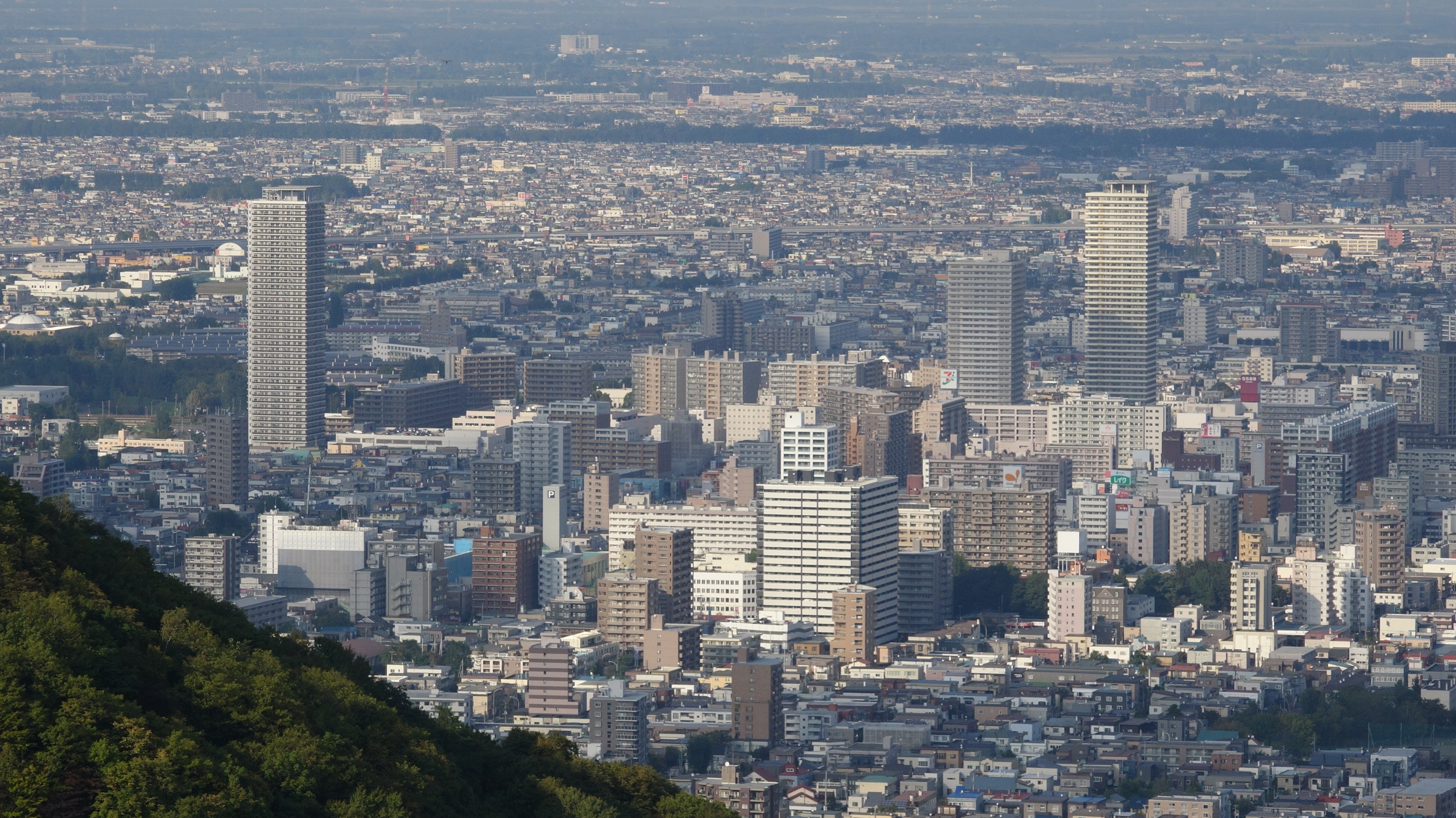 大倉山から見た琴似とその周辺 （2014年9月）